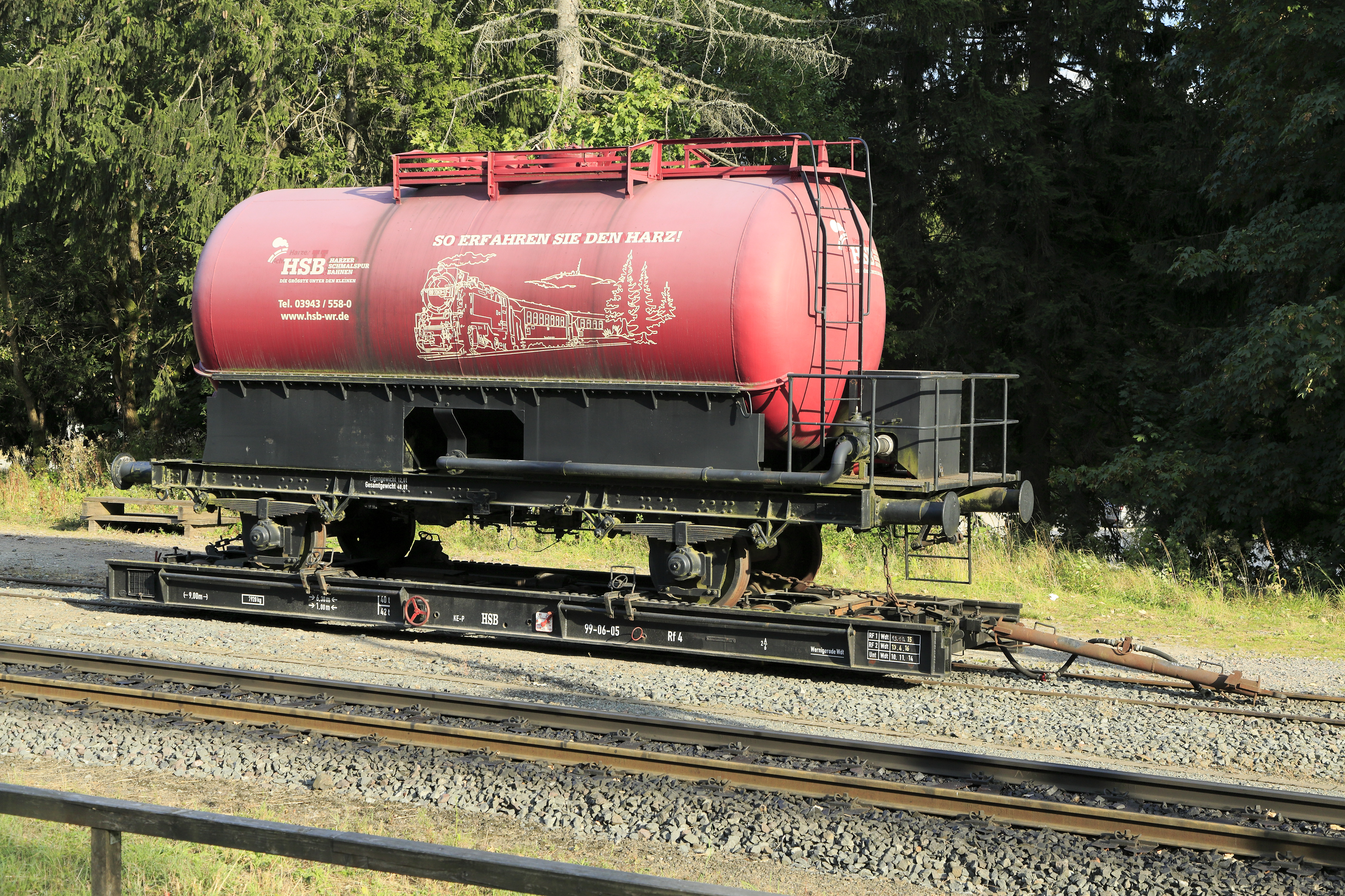 Rollwagen mit aufgerolltem Kesselwagen für den Wassertransport zur Brockenkuppe. Warum man das so umständlich macht, anstatt meterspurige Kesselwagen zu benutzen, weiß wohl auch die Leitung der HSB nicht. Die Wagen werden ohnehin nie abgerollt, es gibt in Wernigerode auch keine Rollwagenrampe mehr und meterspurige Kesselwagen hätten eine deutlich geringere Leermasse.